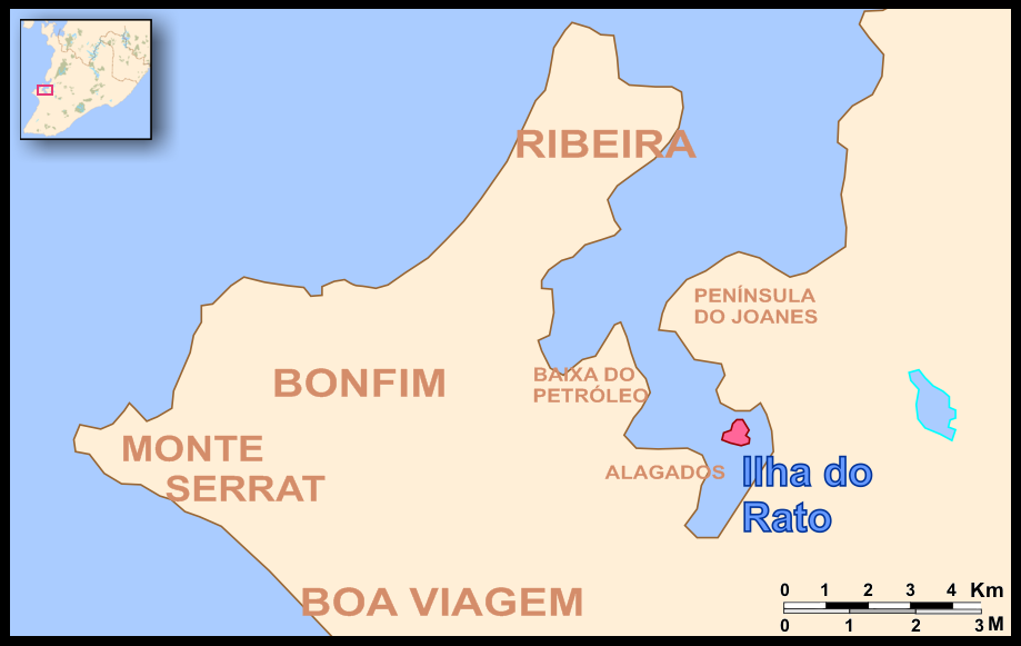 Mapa de Salvador (Bahia, Brazil) - Ilha do Rato